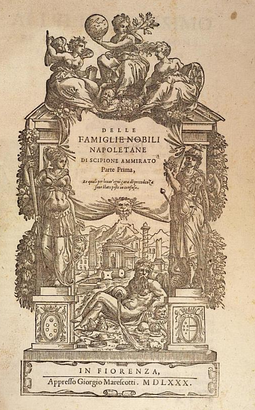 Delle Famiglie Nobili Napoletane, Volume 1, 1580, Scipione Ammirato (1531-1601)